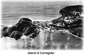 Corregidor island.